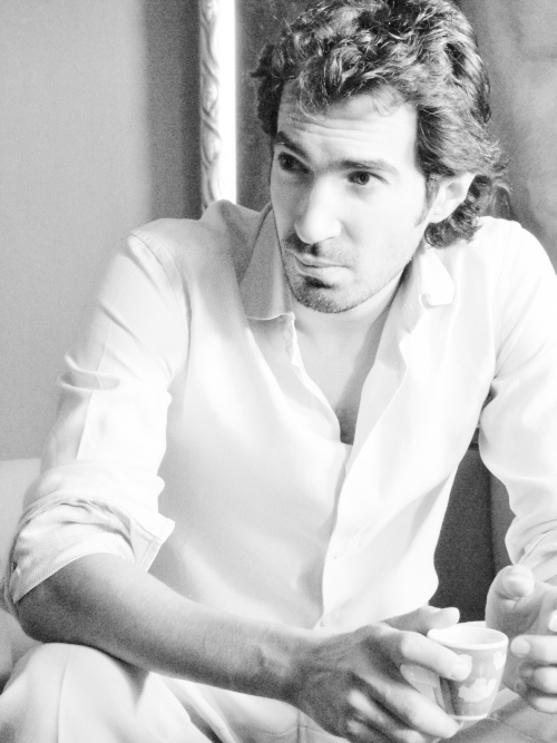 La foto è stata scattata a Winterthur Svizzera durante una intervista per la rivista Tango Danza. I colori sono stati modificati perché il file originale era troppo scuro.